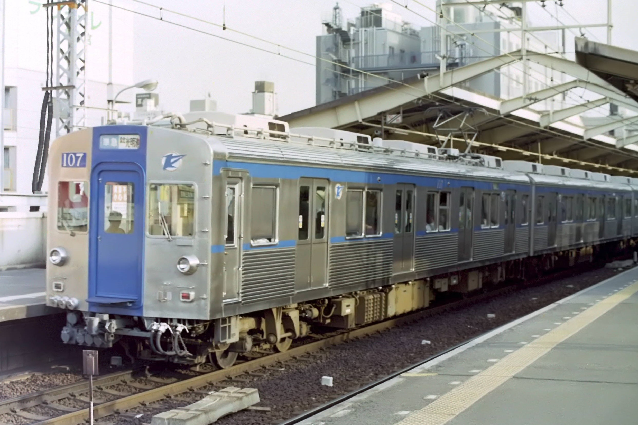 泉北高速鉄道100系 107